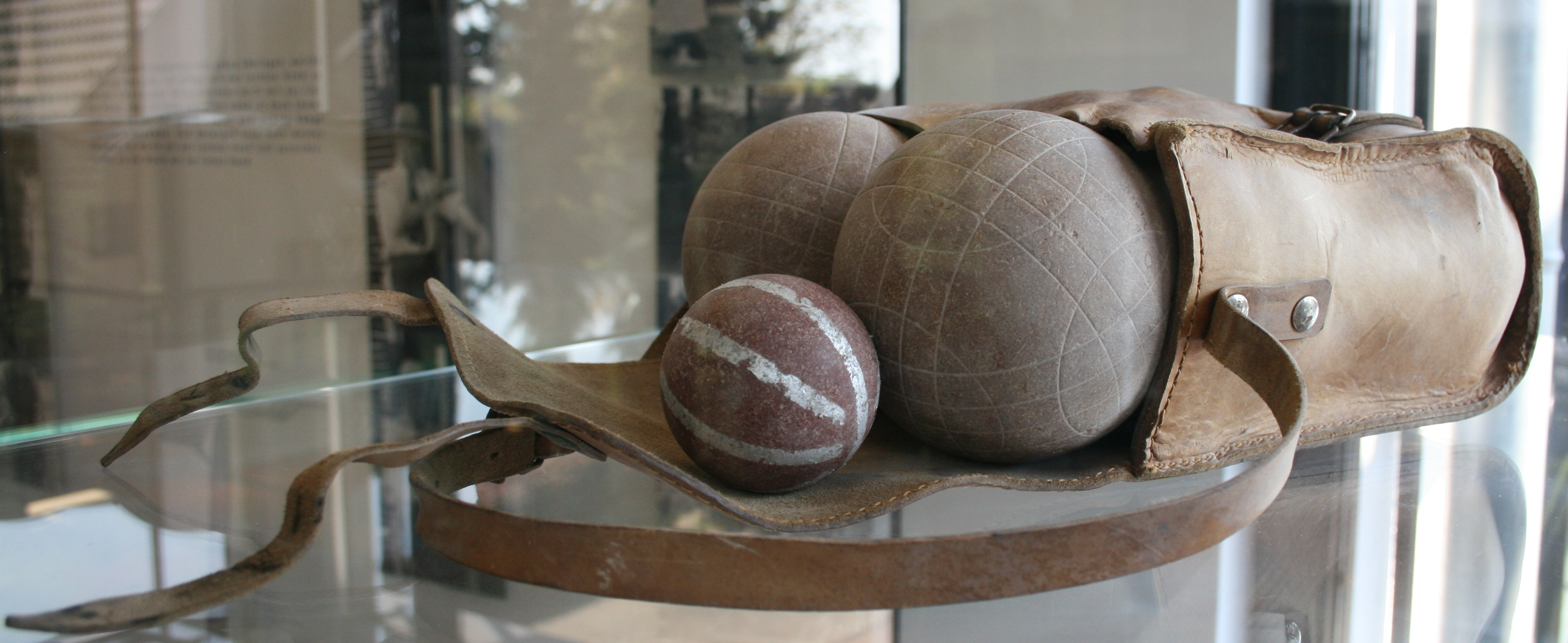 Konrad Adenauers Bocciakugeln (Exponat der Dauerausstellung über das Leben Konrad Adenauers im Sitz der Stiftung Bundeskanzler-Adenauer-Haus in Bad Honnef-Rhöndorf).